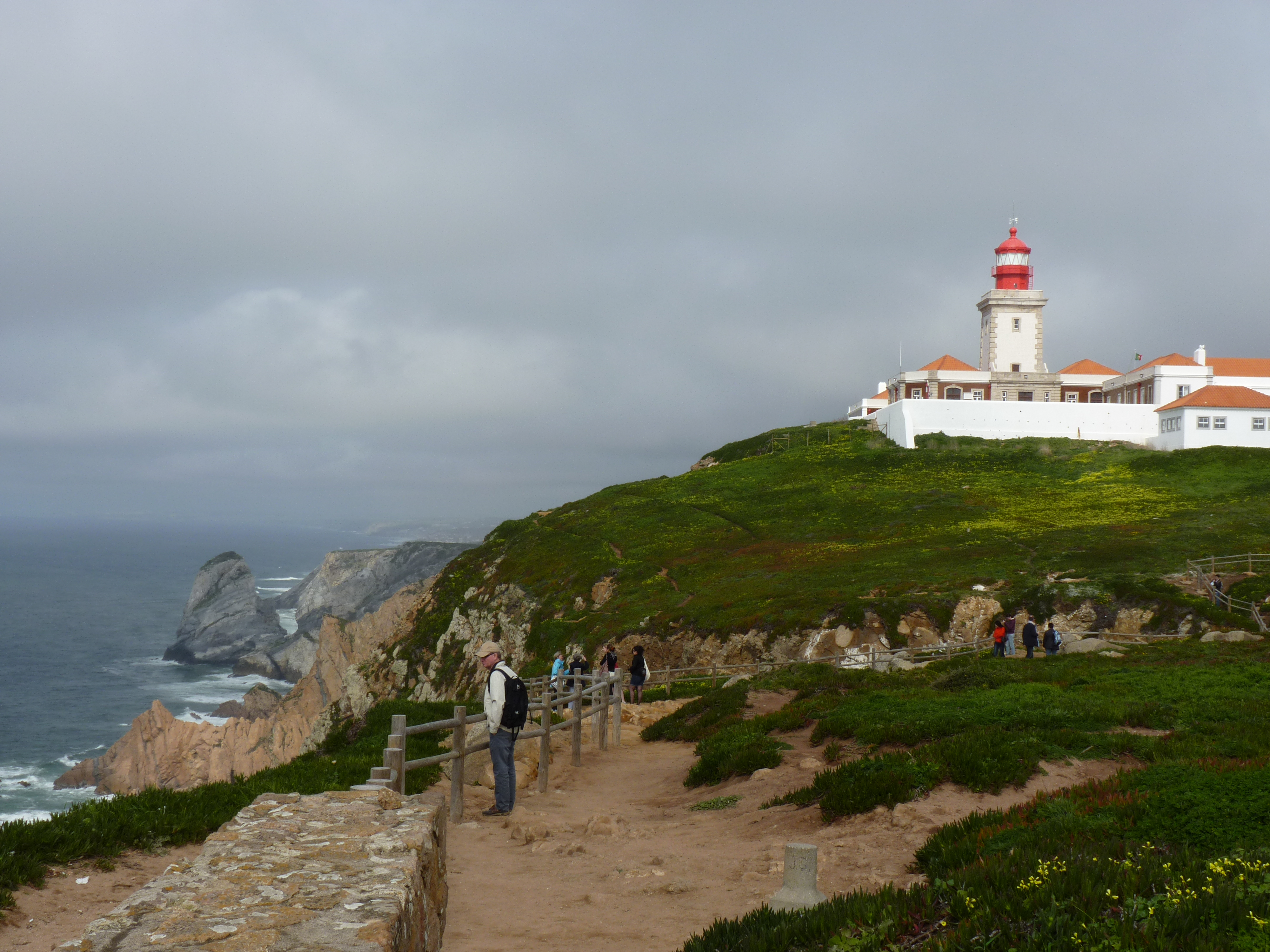 Cabo da Roca